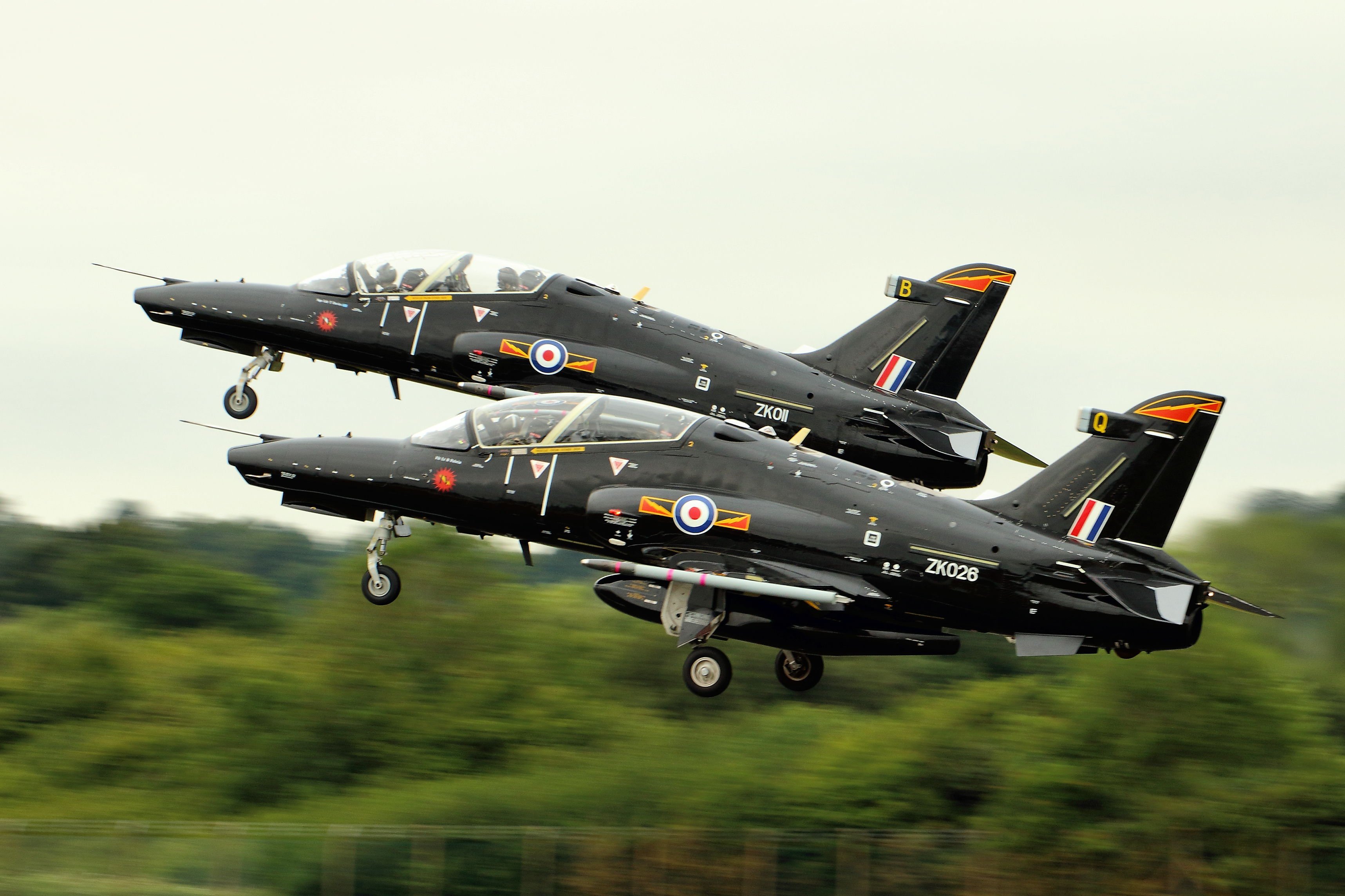 Hawk T.2 - RIAT 2015